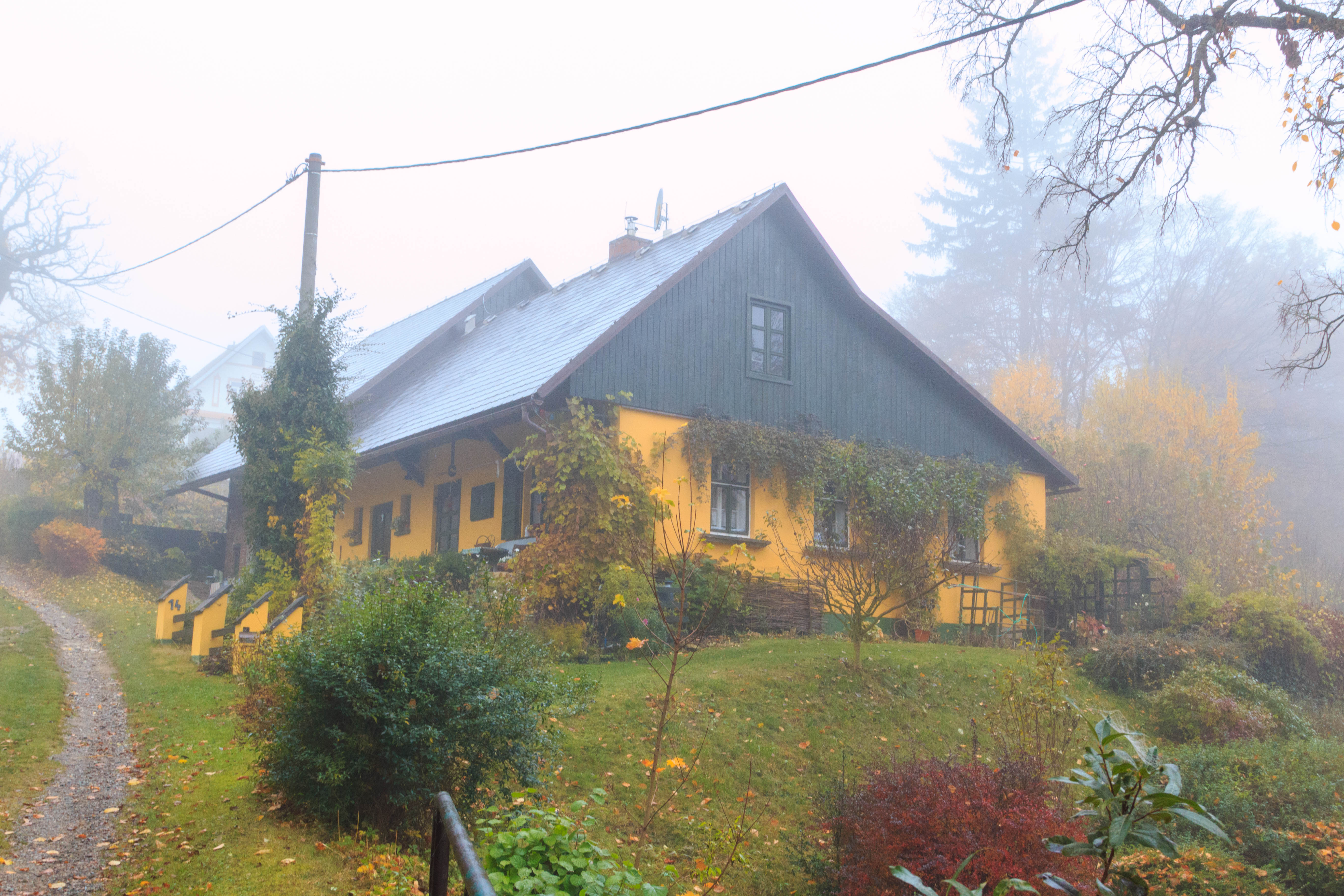 Radostovice u Lična - čp. 14